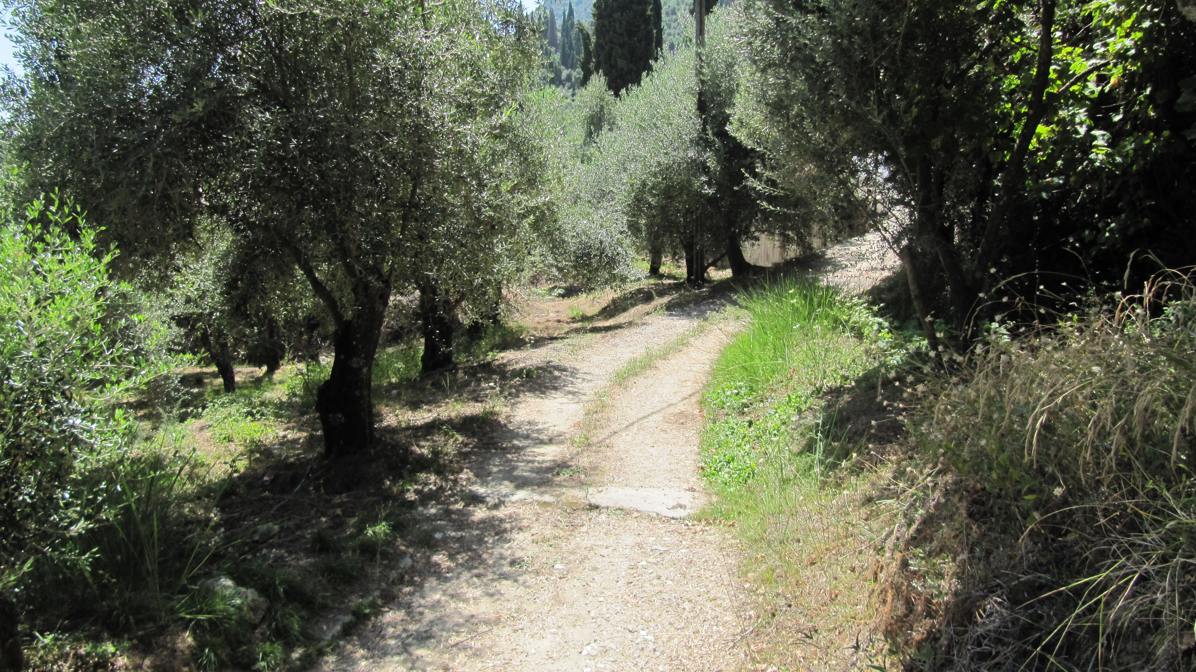 Chemin près d'un champ d'oliviers à Benitses (Corfou)